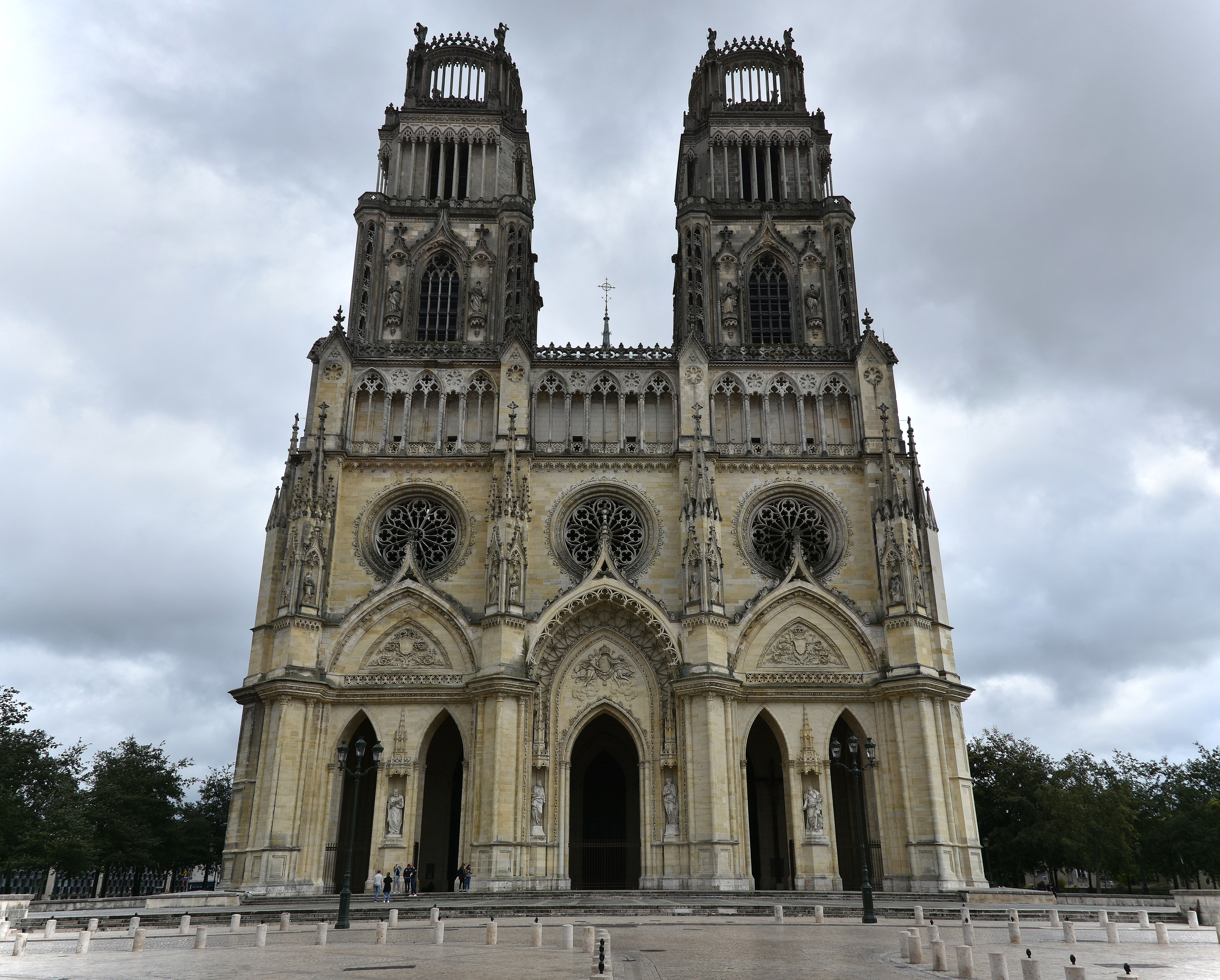 Kathedraal van Orléans 29-09-2019 13-39-40